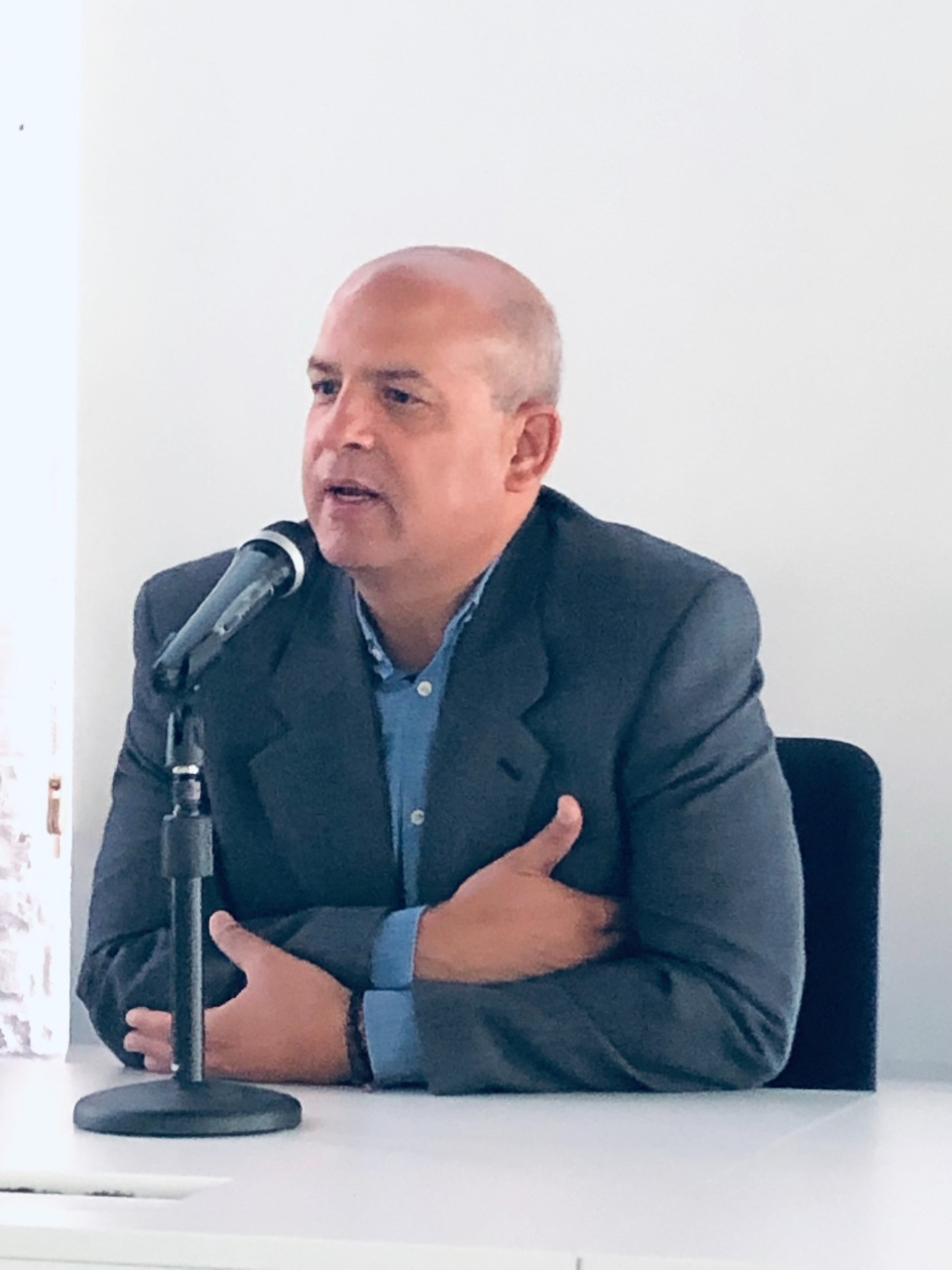 Jose Enrique Delmonte, arquitecto, historiador y poeta